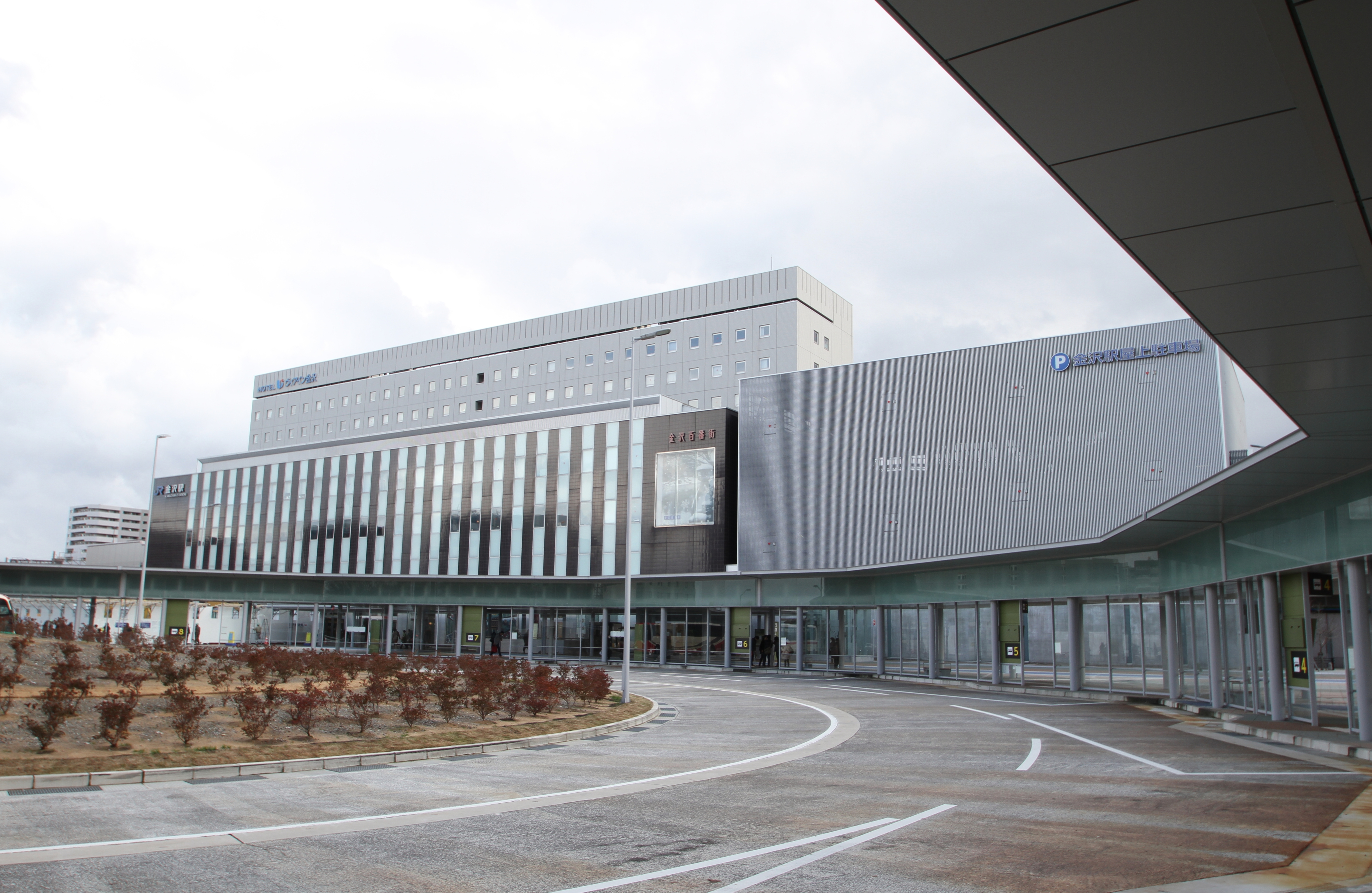 Kanazawa Station